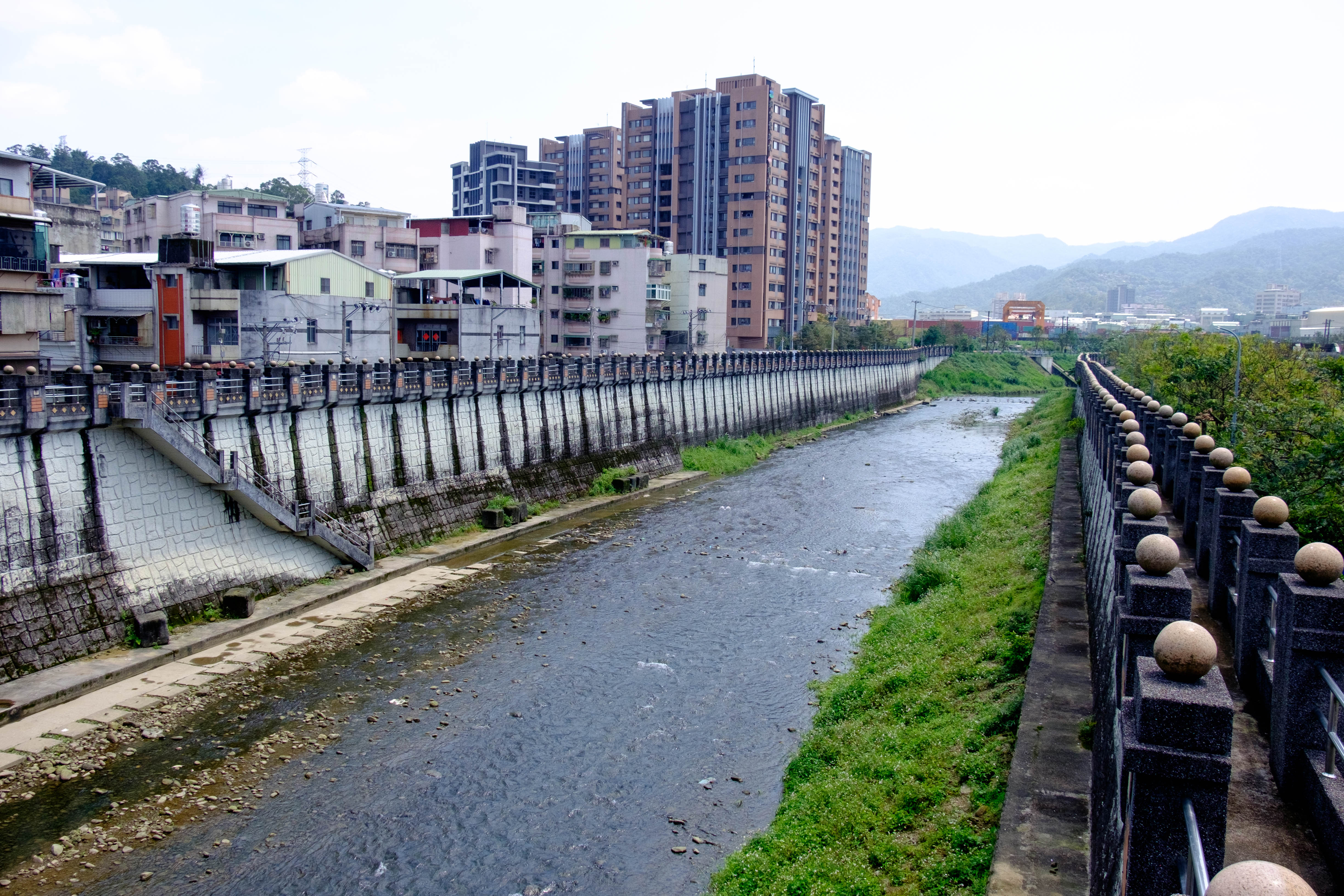 新北市汐止區保長坑溪下游，攝於保福橋水門頂。